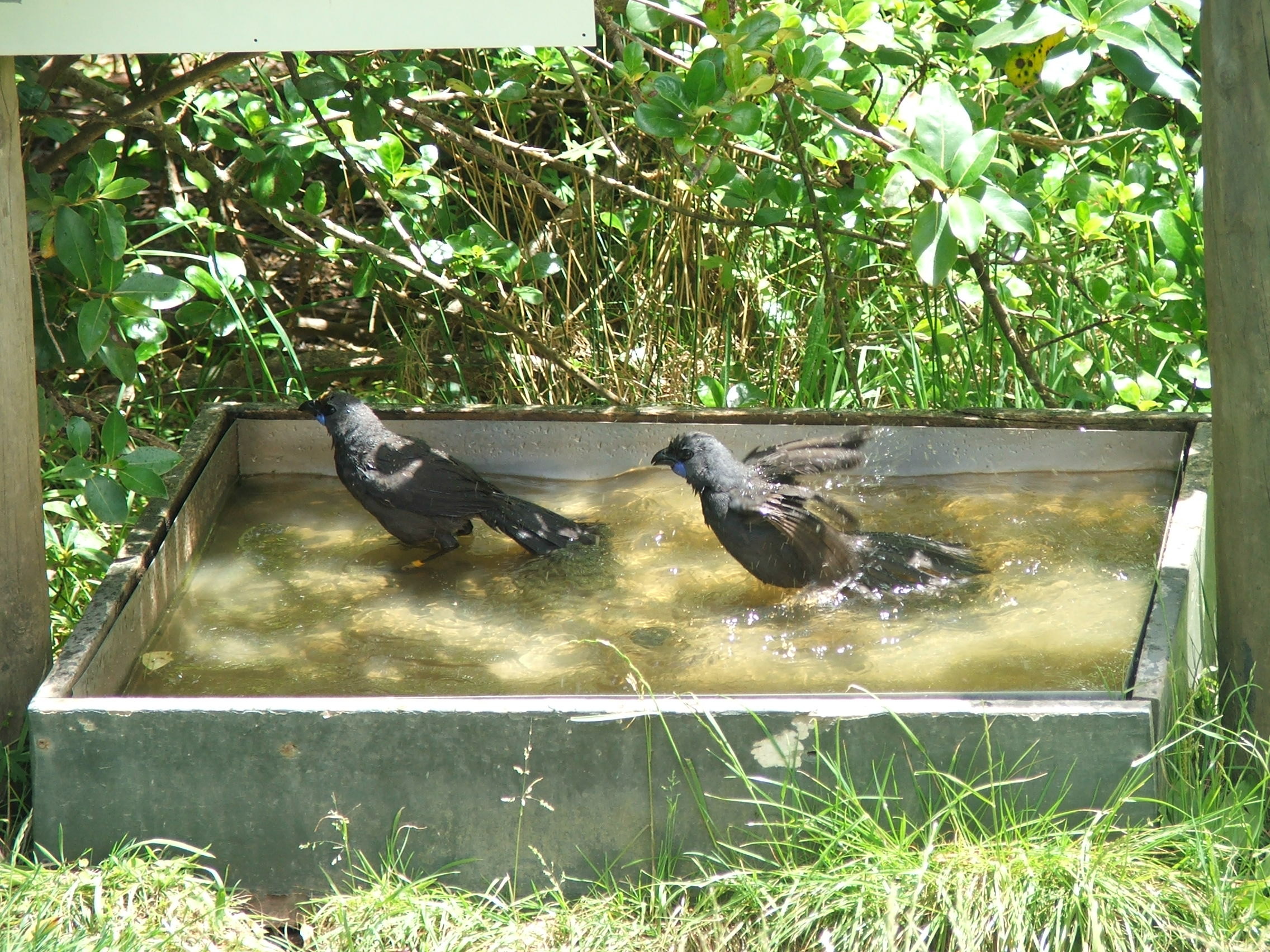 Kokako bathing (Callaeas cinereus) on Tiritiri Matangi Island.